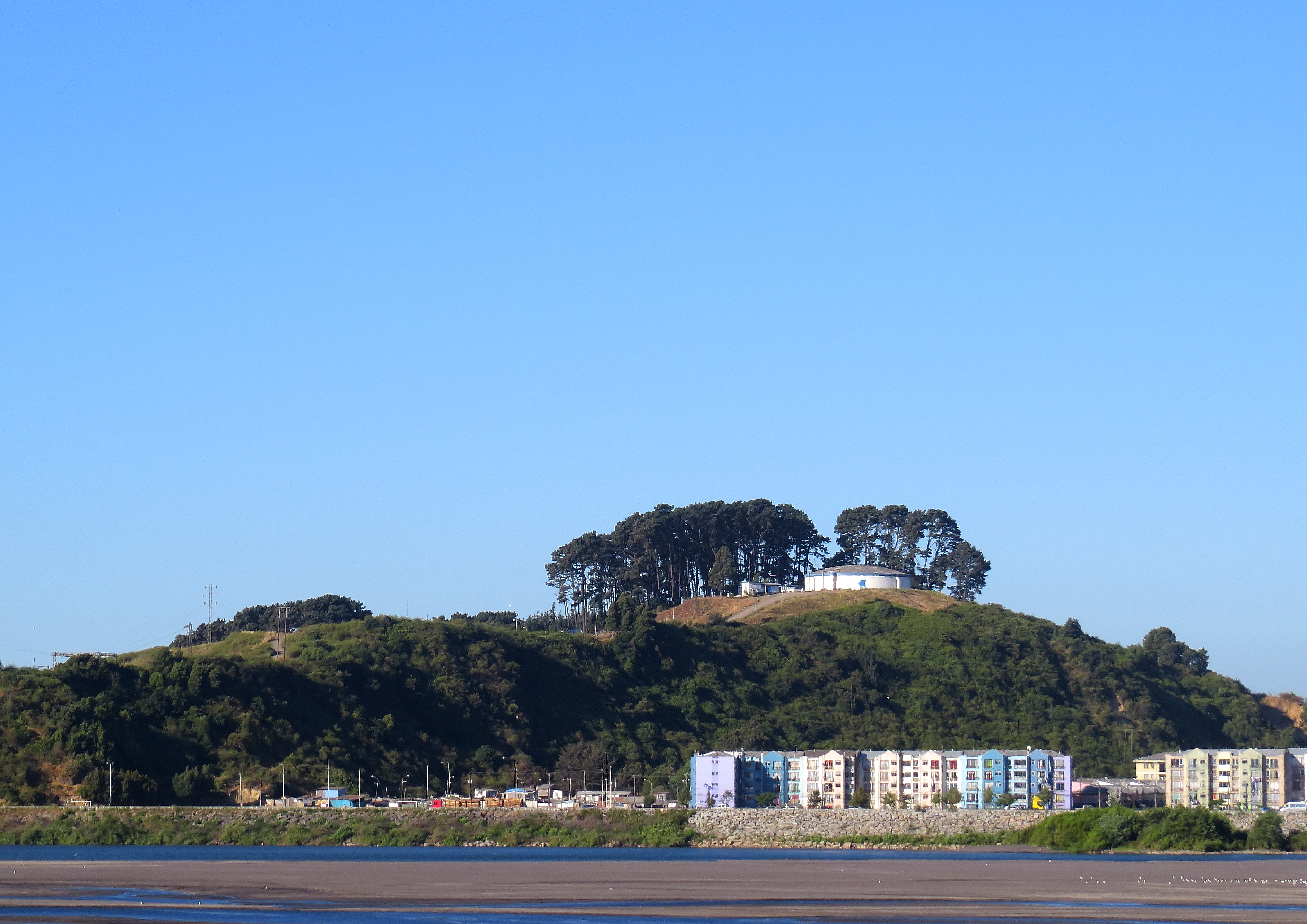 Cerro Chepe visto desde el puente Llacolén